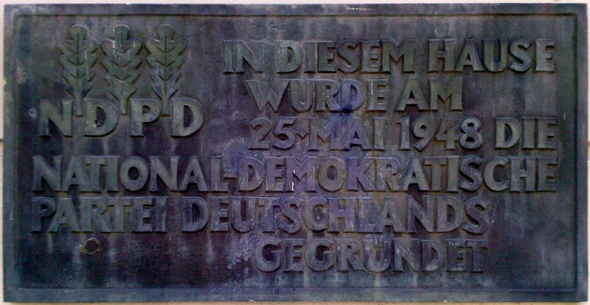 Gedenktafel am Gründungsort der National-Demokratischen Partei Deutschlands (NDPD) in Potsdam, Lindenstraße 44, erstellt im Mai 1988 zum 40-järigen Bestehen der NDPD